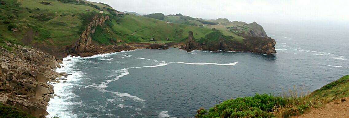 Ensenada de Puerto Calderón, en Oreña (Cantabria, España). Fue un antiguo cargadero de mineral de zinc.